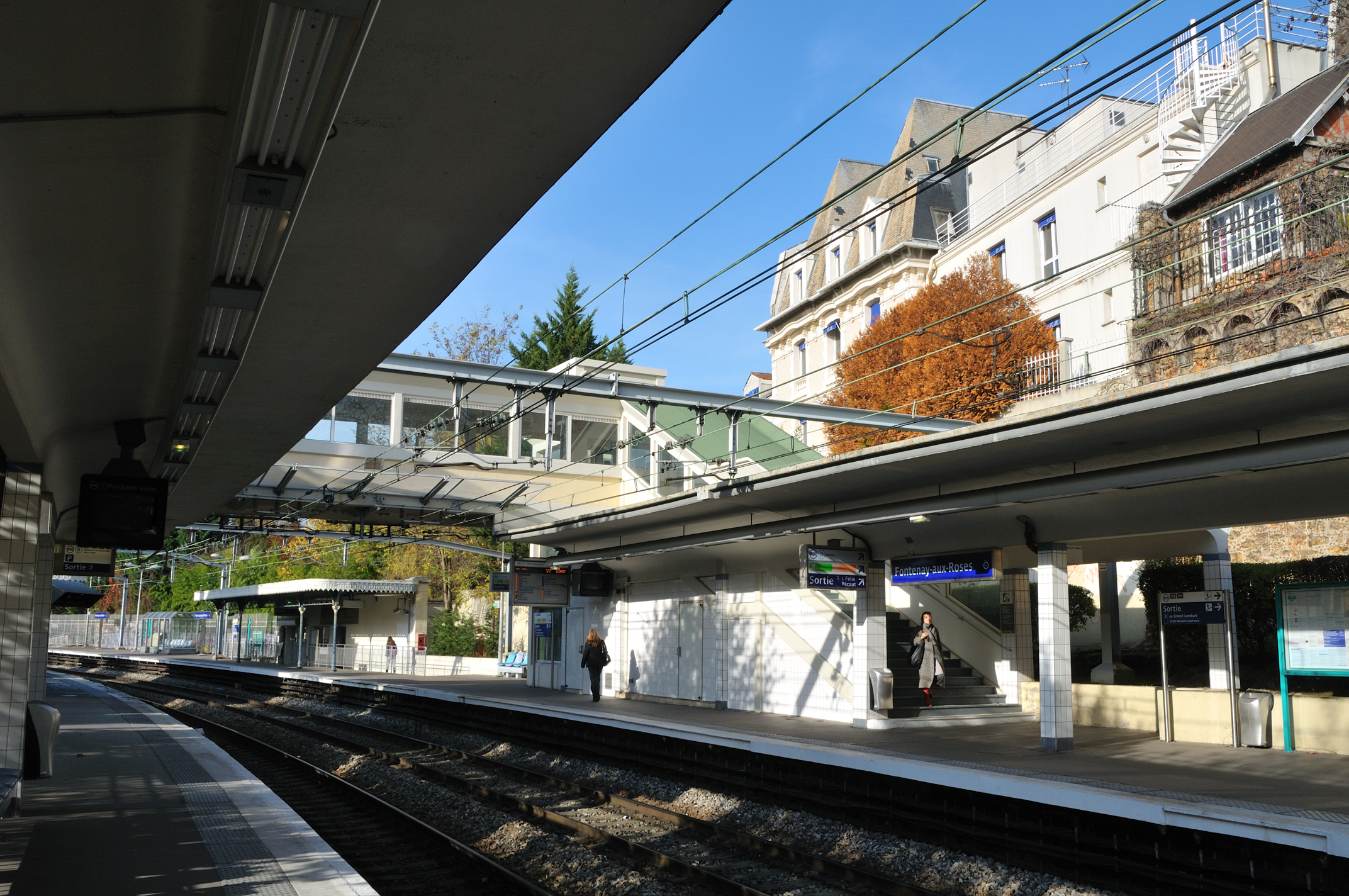 Gare de Fontenay-aux-Roses, Hauts-de-Seine, France